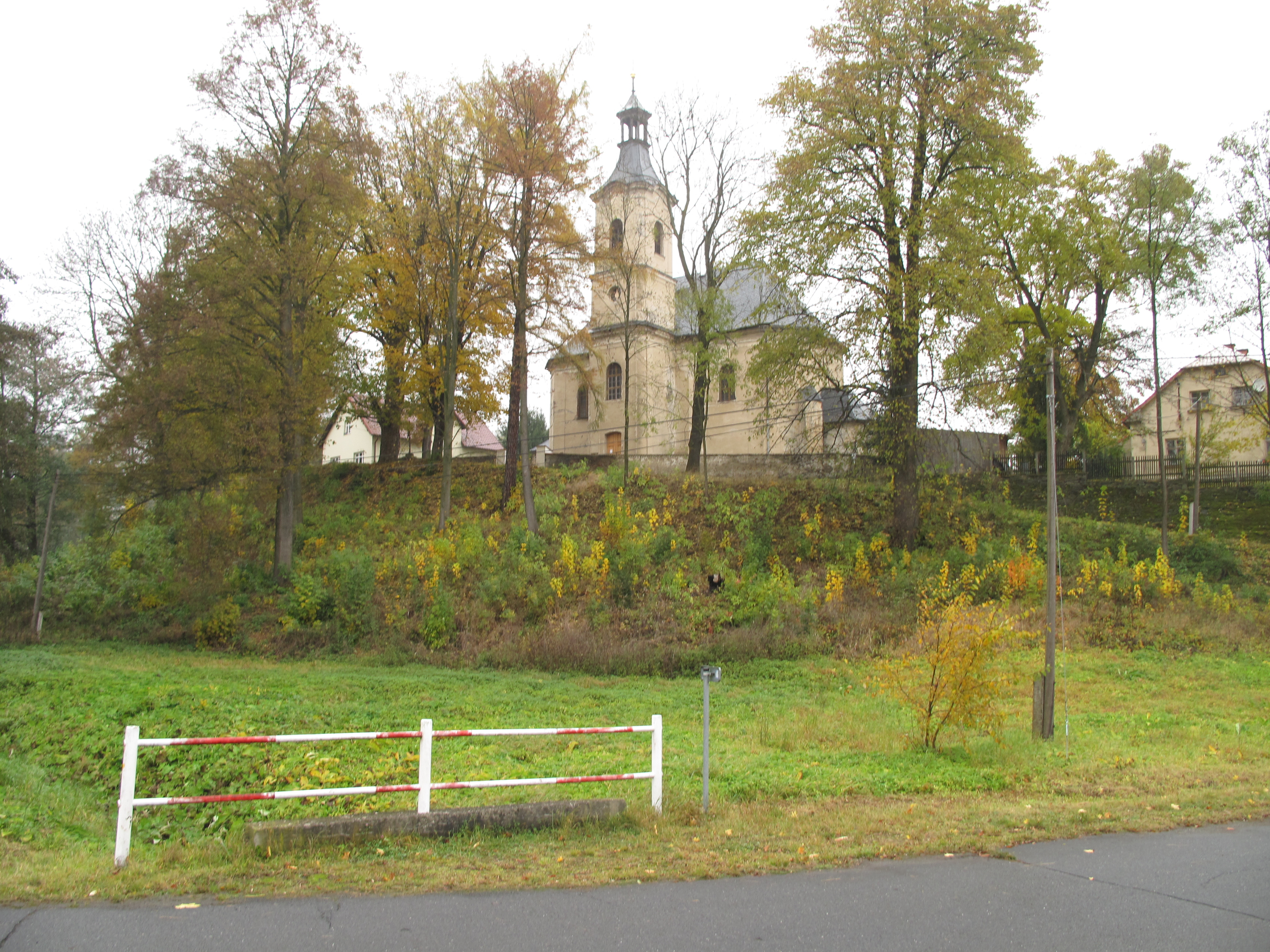 Dětřichovice. Okres Bruntál, Česká republika.